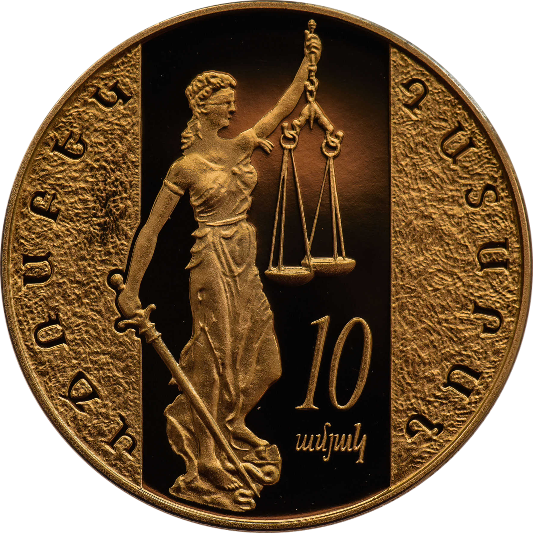 Памятная монета Армении 2008 года "10 лет Кассационному Суду Армении" - 10000 драм - золото 900